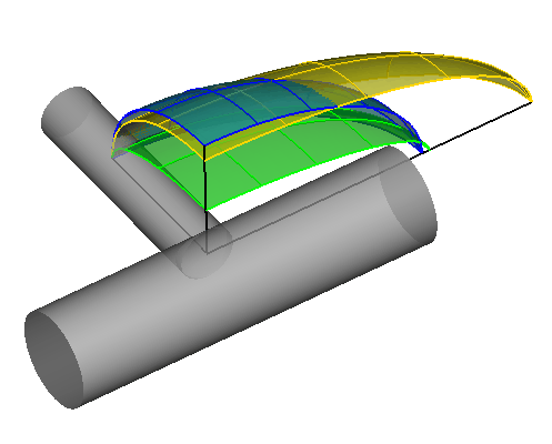 Starrer Körper (grau) mit Trägheits- , Drehimpuls- und Massenellipsoid (blau, gelb bzw. grün), die alle auf gleichlange 2-Achsen skaliert sind